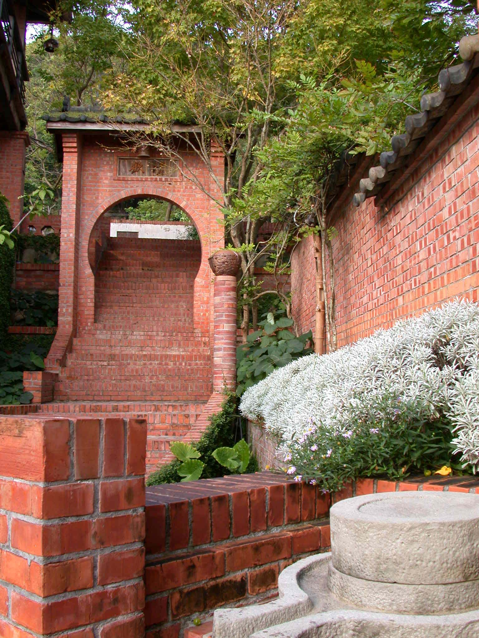 中文（台灣）: 華陶窯荷蘭式砌法紅磚牆